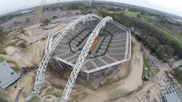 El Estadio Mary Terán de Weiss durante la construcción del techo corredizo.